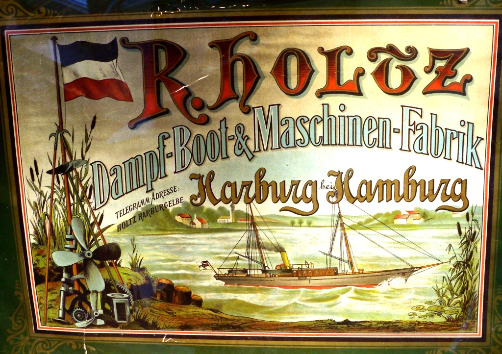 Werftschild der Schlosswerft in Harburg